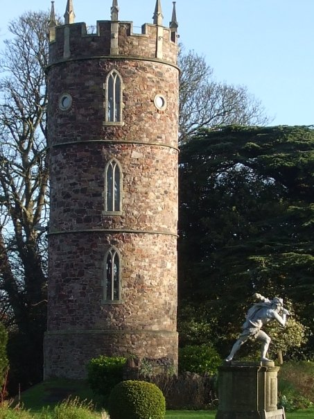 Goldney Hall